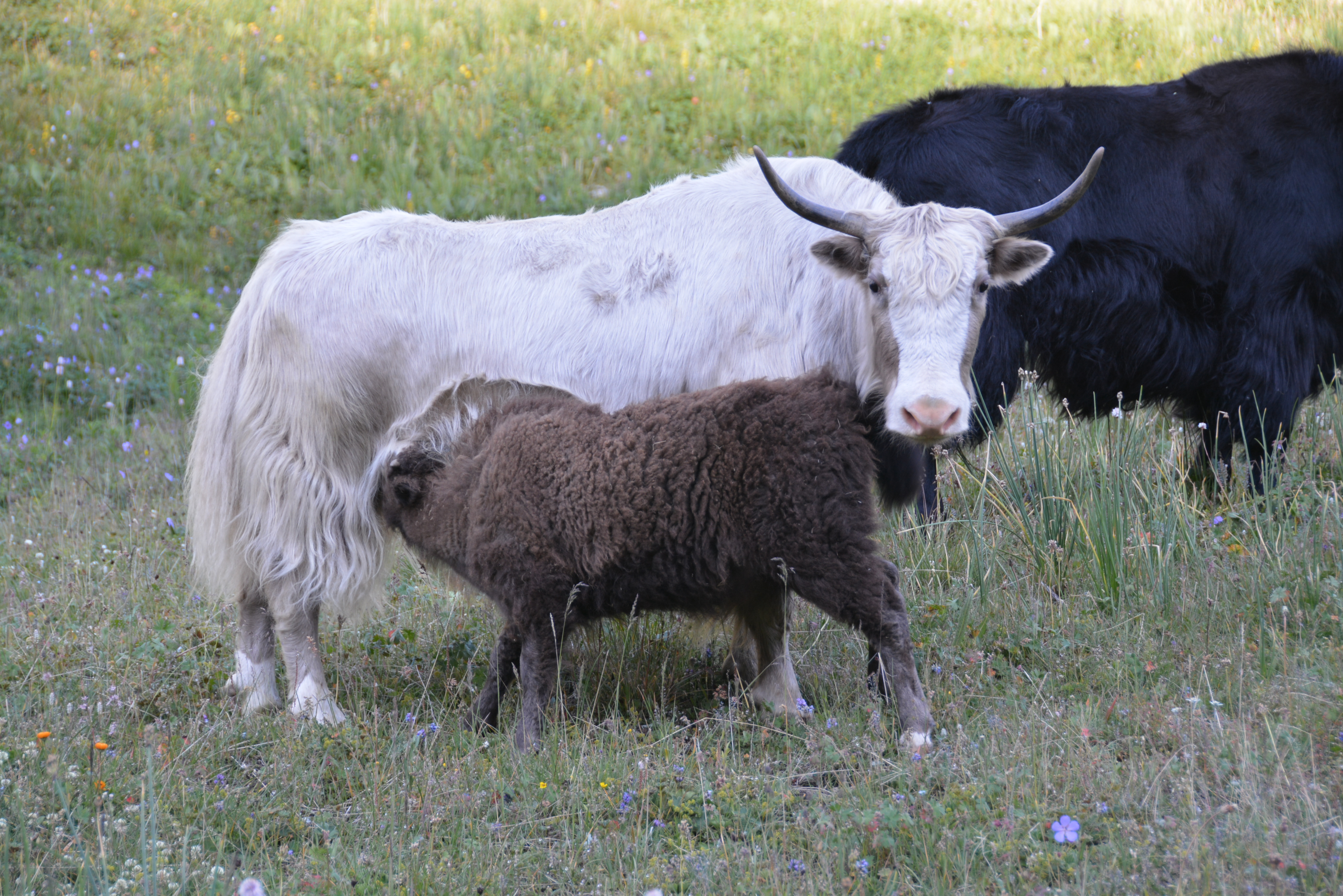 Группа яков с теленком в горах Заилийского Алатау. Район Мынжилки (ущелье Малой Алматинки). Июль 2017 года.